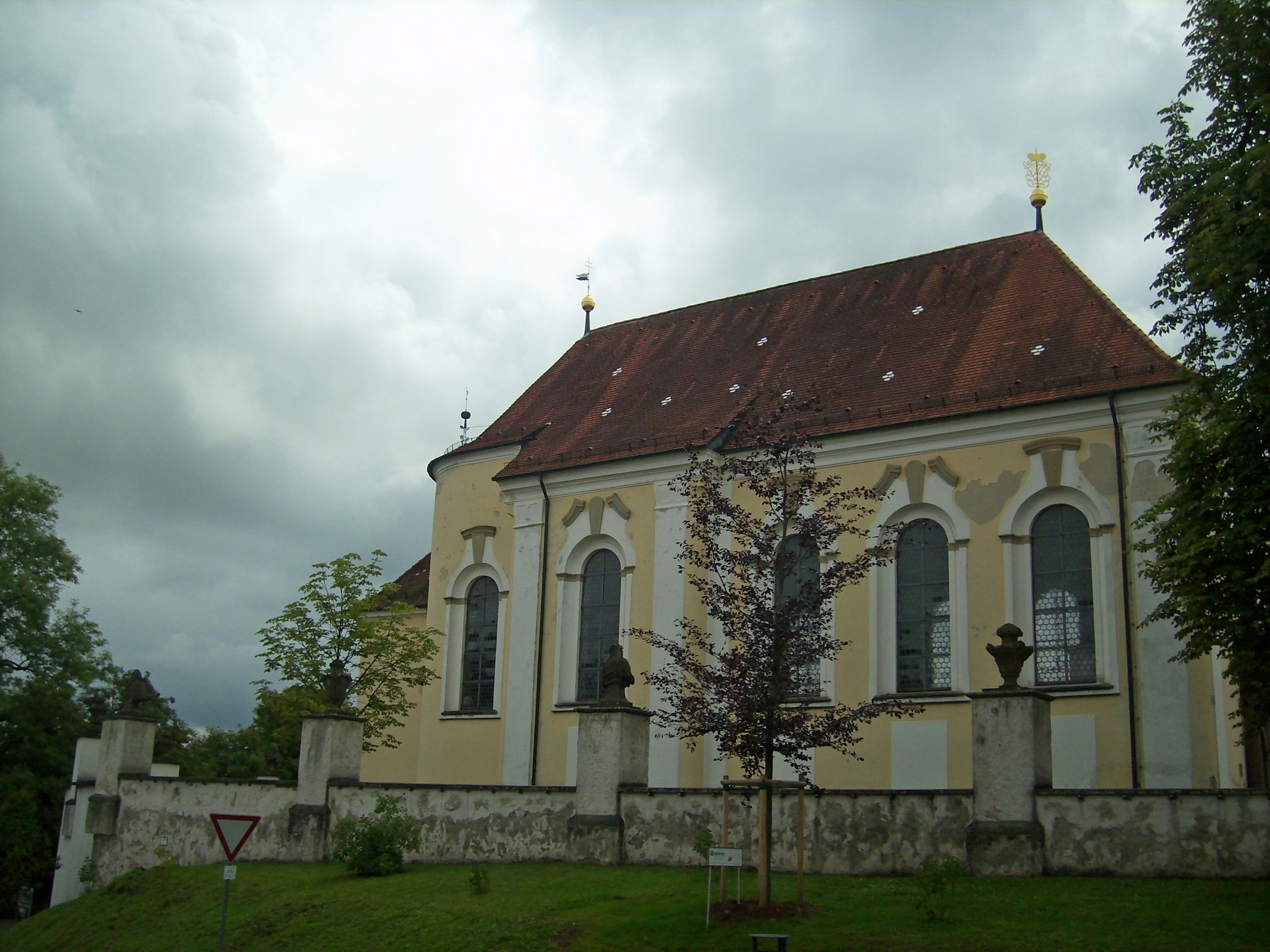 Haigerloch Wallfahrtskirche Sankt Anna